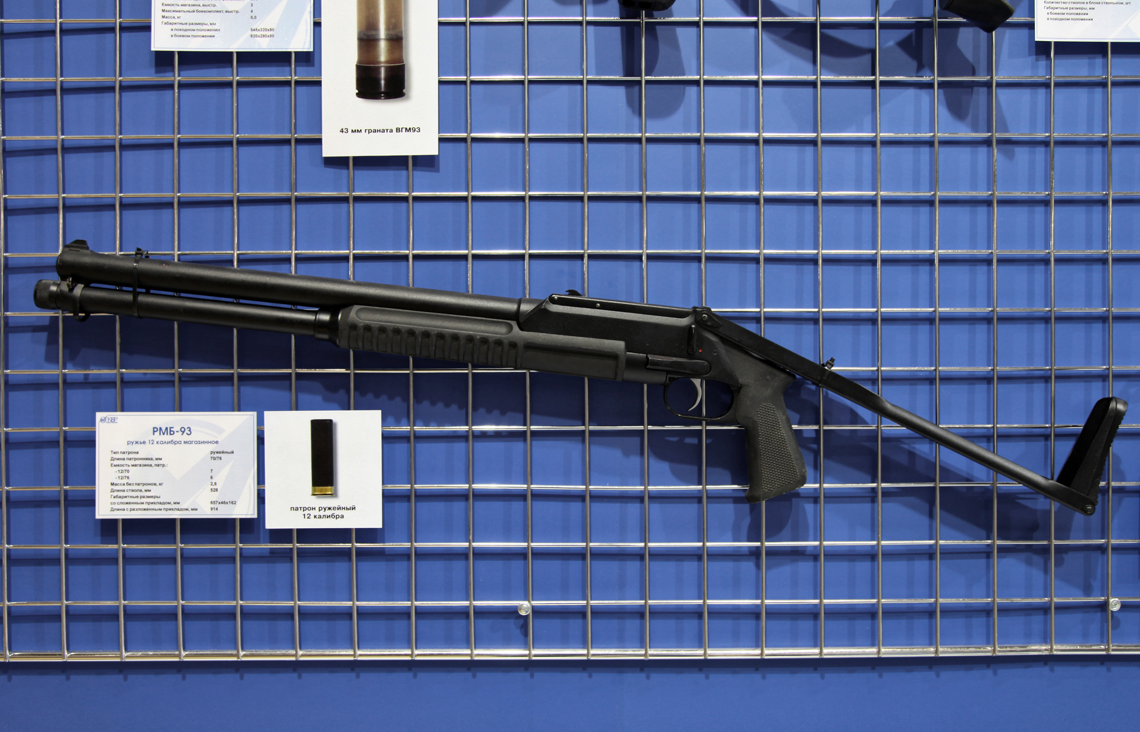 Ружье РМБ-93 (RMB-93 shotgun)